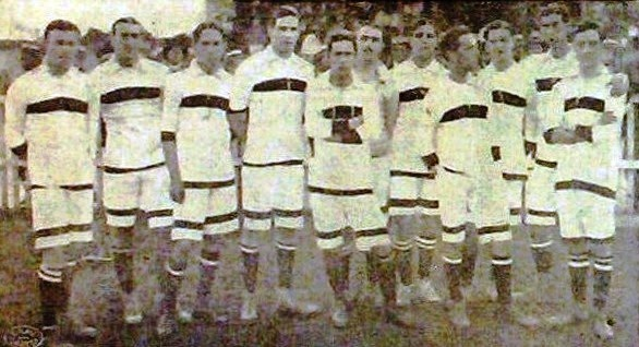 Associação Atlética das Palmeiras, Football Club from São Paulo, Brazil. State Championship winning team of 1915.